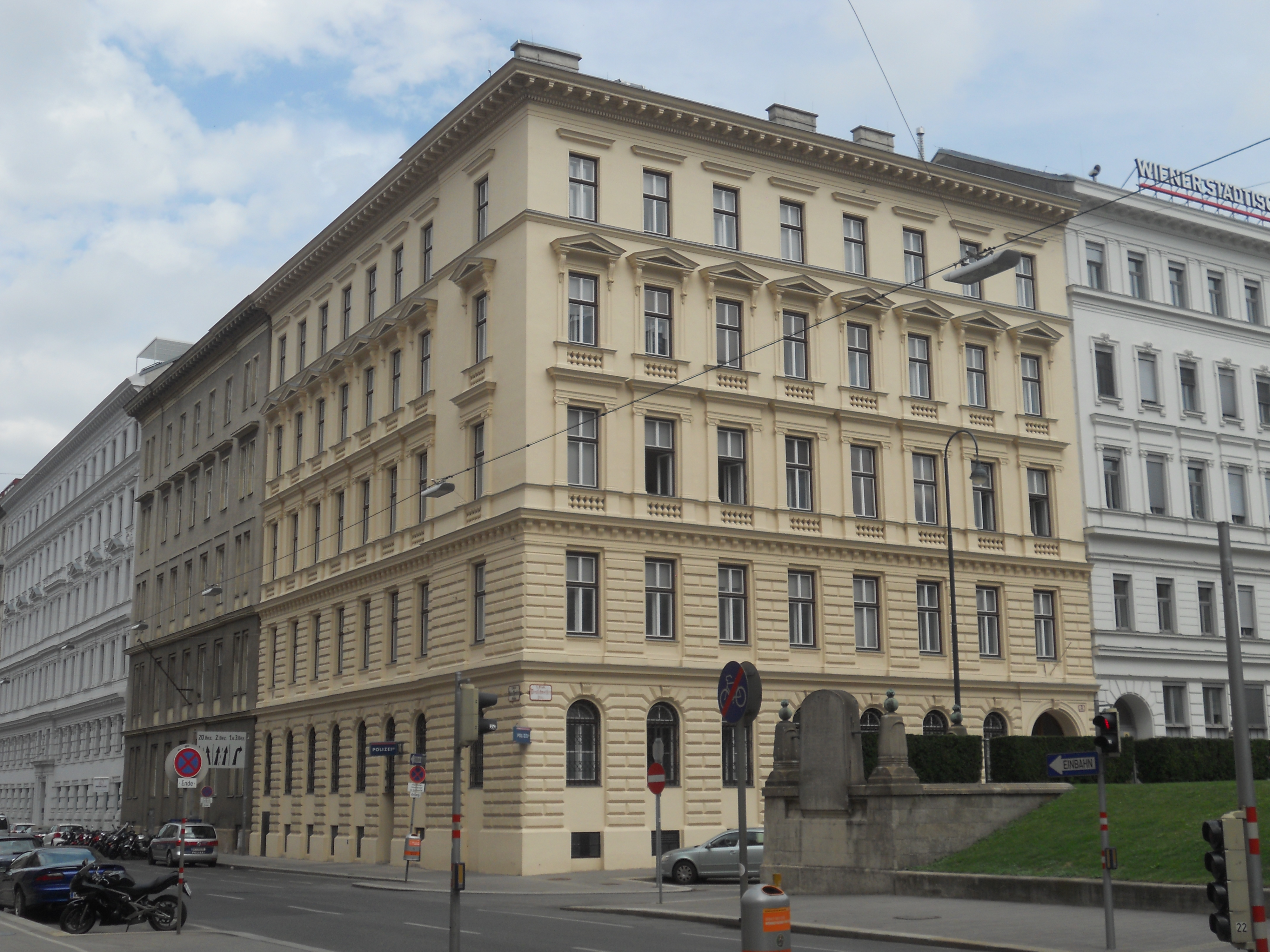 Wohnhaus, Polizeikommisariat